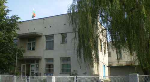 Кметство с. Дражево